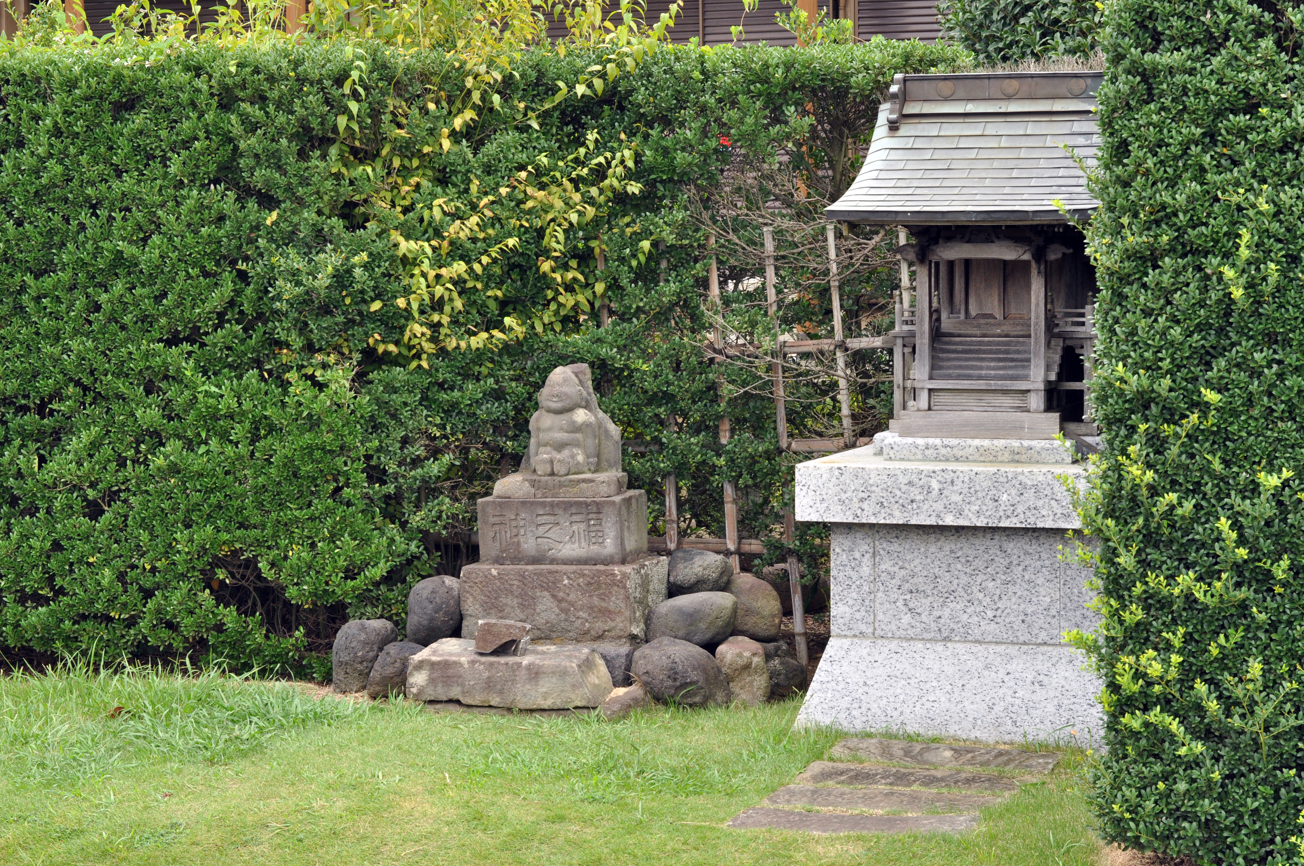 流山市にあるビリケンさんの像と祠